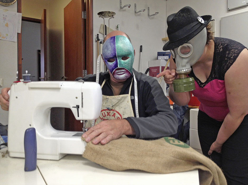 Srylyn en Qooimee achter de naaimachine